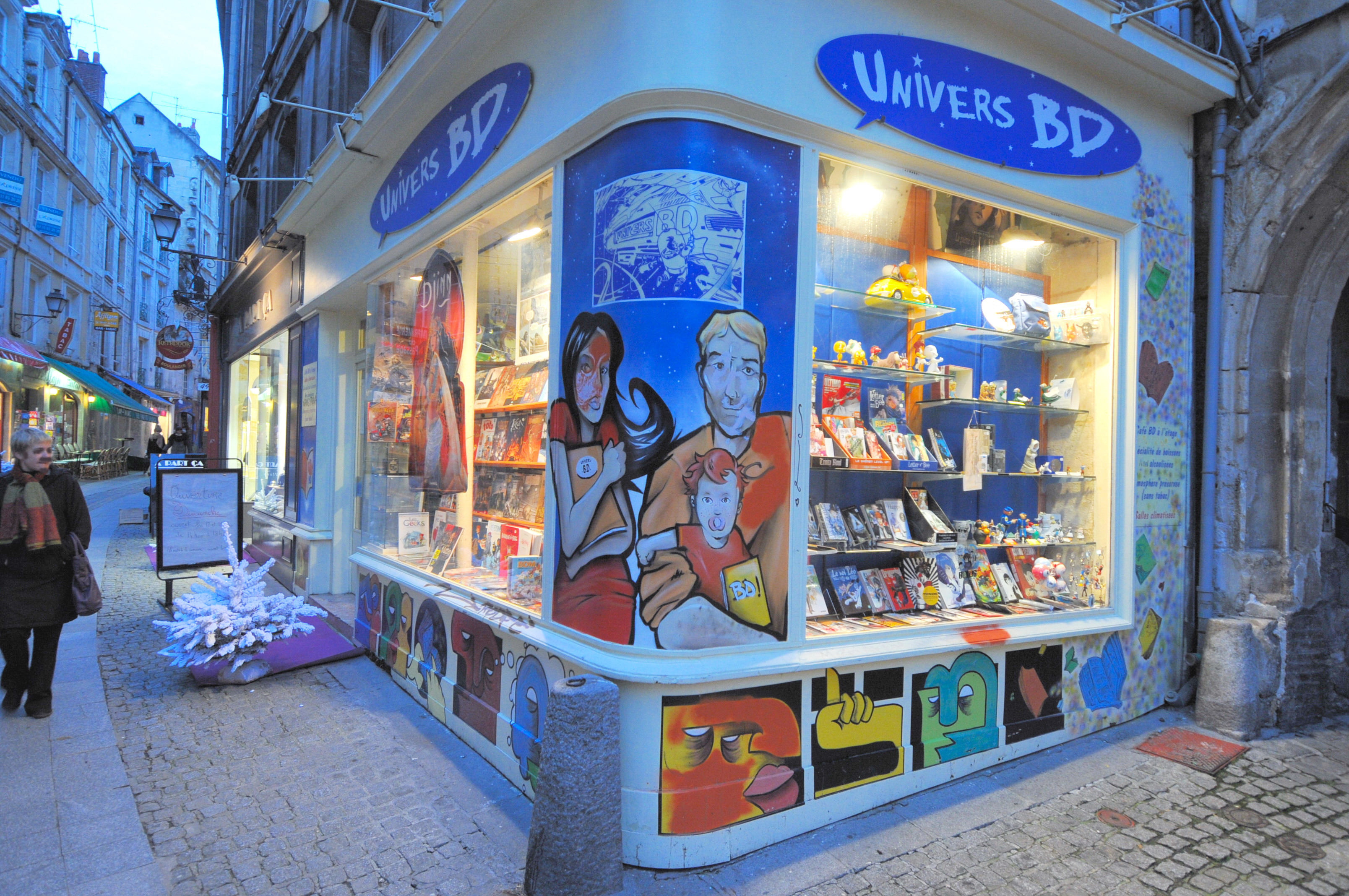 devanture d'une boutique de bandes-dessinées de la rue Froide à Caen dans le Calvados (Basse-Normandie, France).